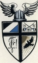 Wappen der Akademischen Fliegerschaft Preußen an der Albertus-Universität Königsberg.